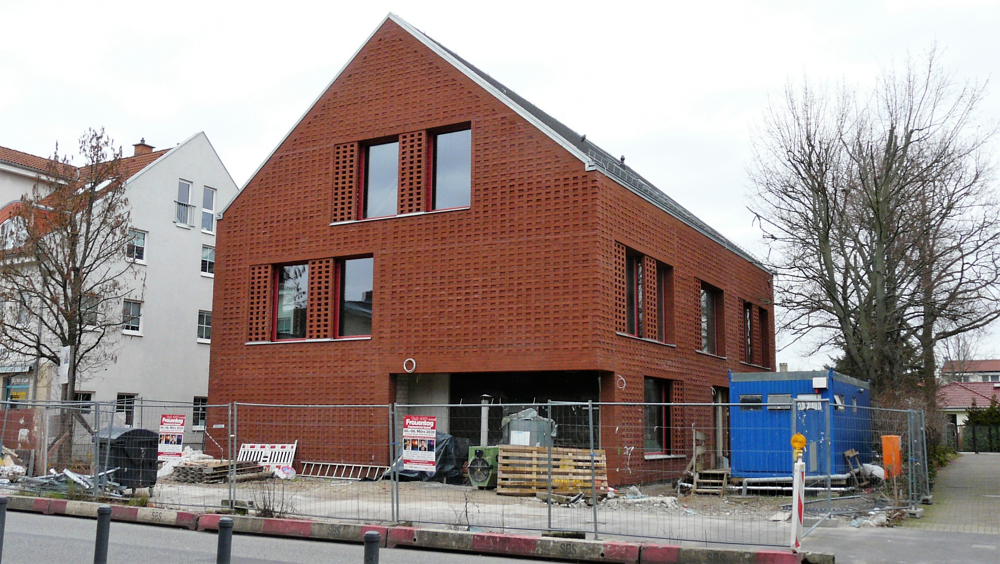 Rudow Alt-Rudow Bibliotheksneubau